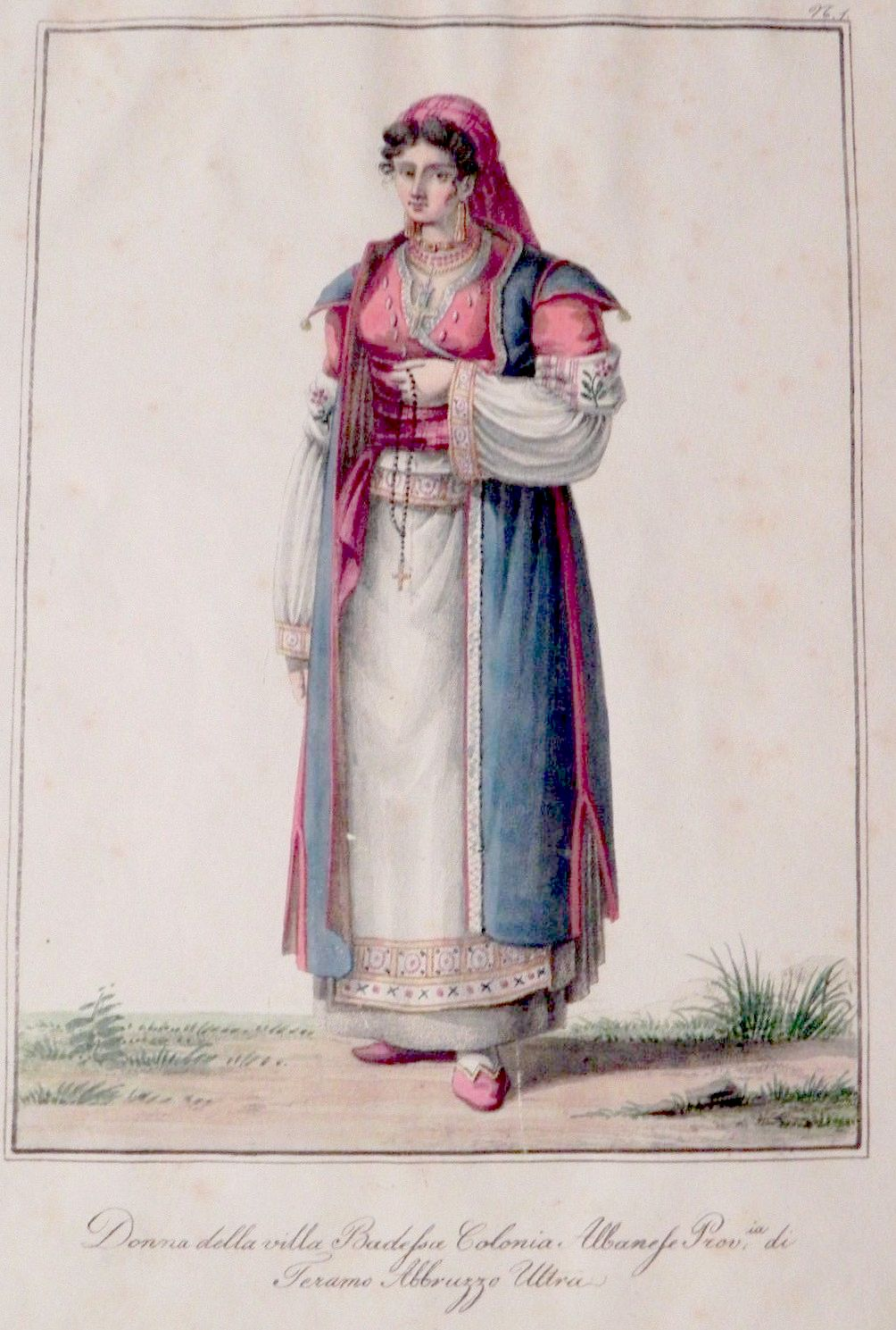 Albanesische Frau von Villa Badessa